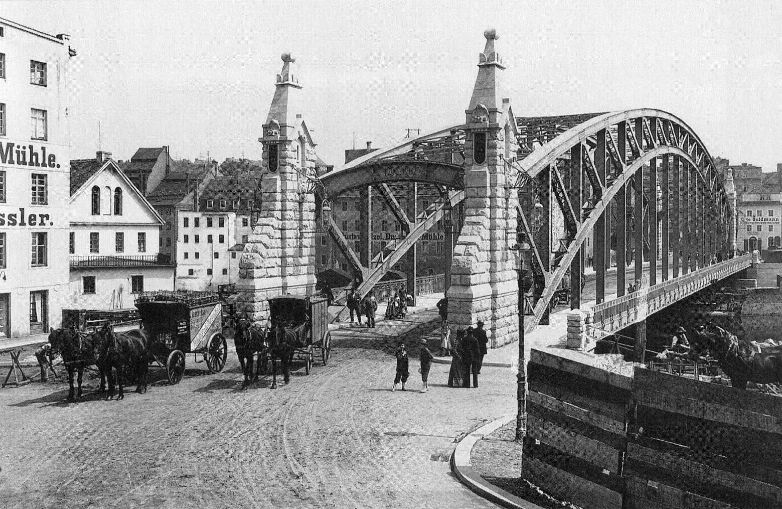 Die 1907 neu in Betrieb genommene Altstadtbrücke. (1945 gesprengt)